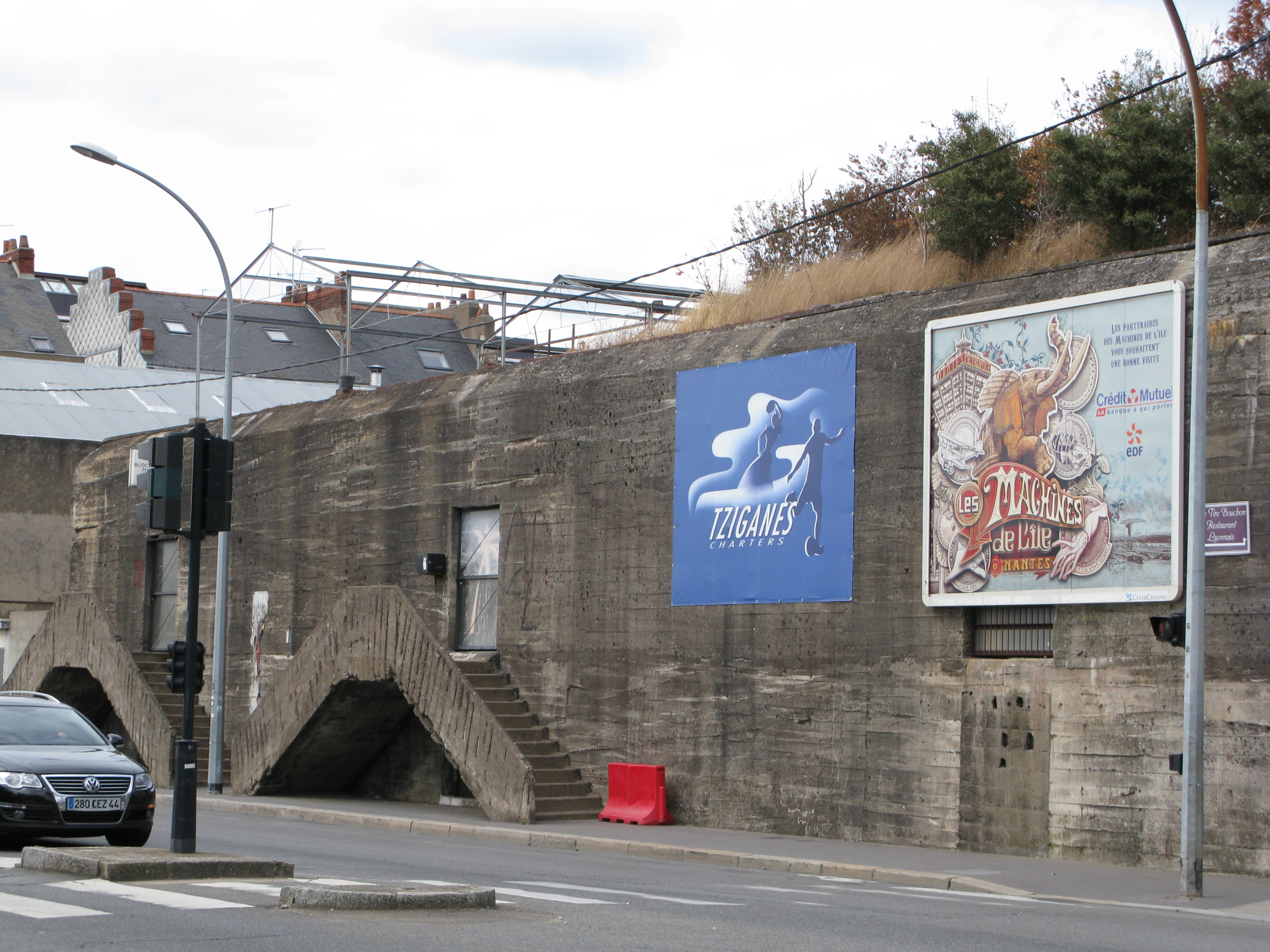 Le Blockhaus DY10 en août 2010.